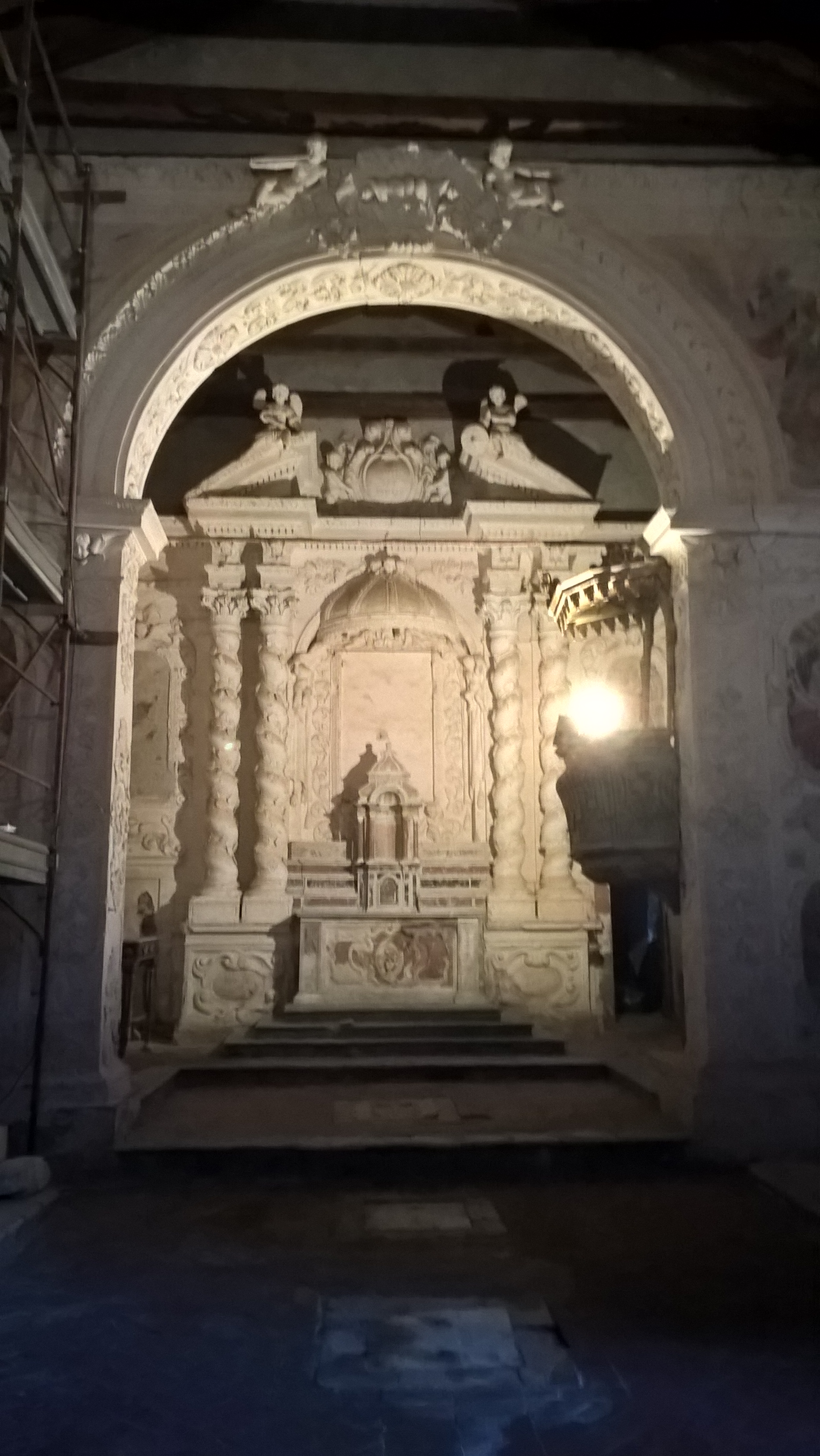 Interni Chiesa San Michele